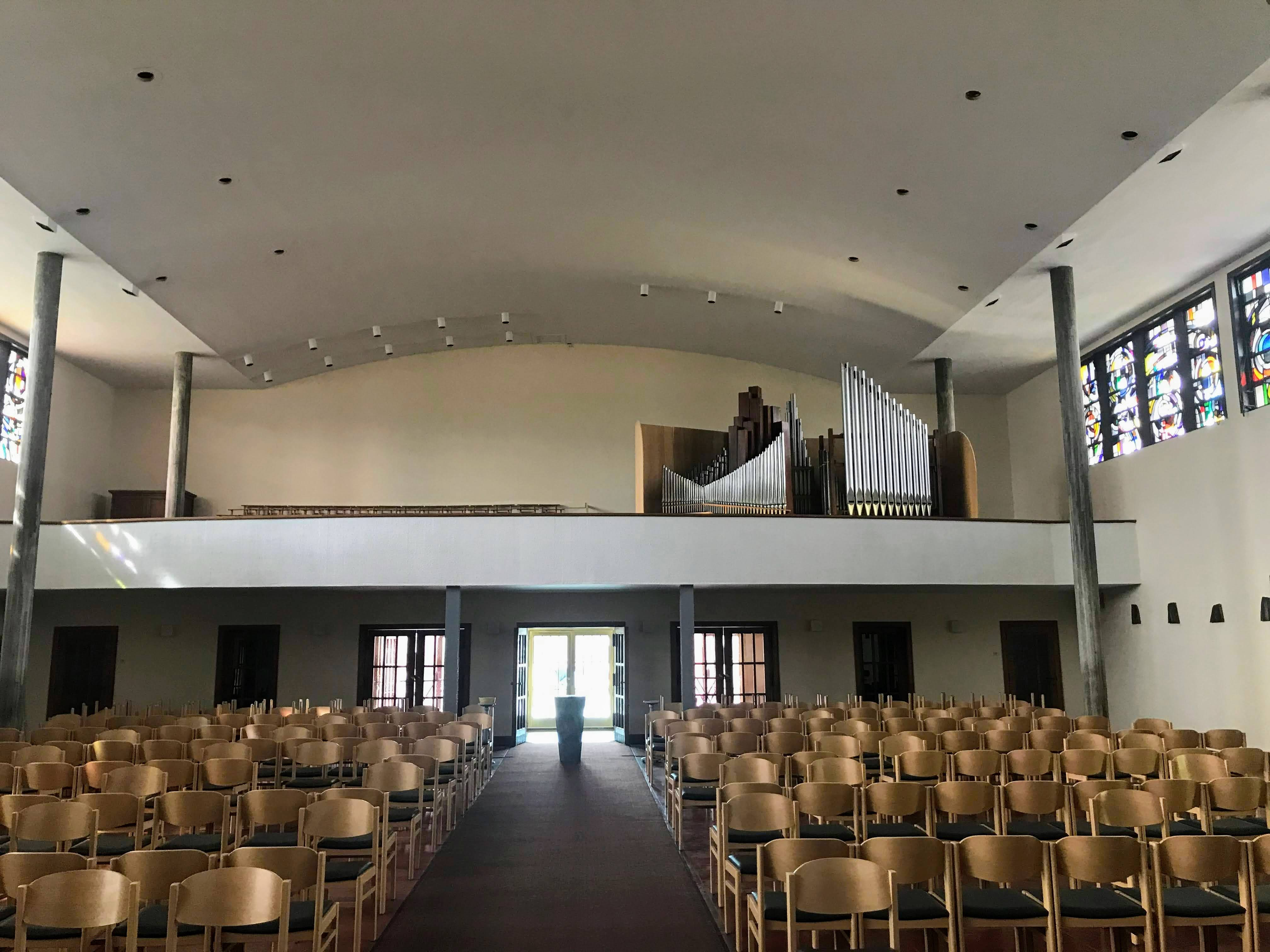 L'orgue de l'église de Marloie